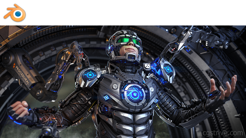 Titelbild der Blender-Version 2.78b